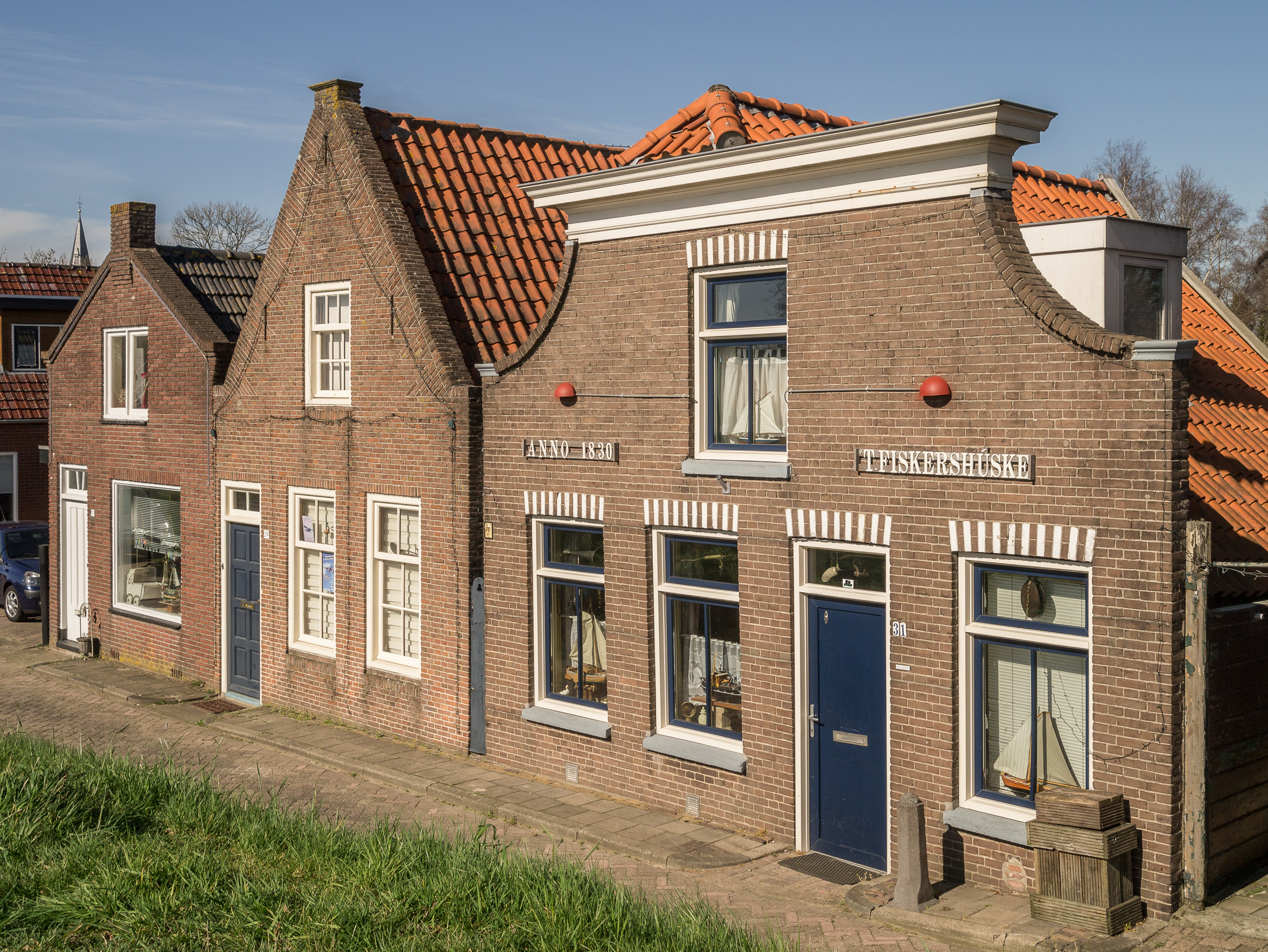 Zwartsluis, Mastenmakersstraat 27,29 en 31